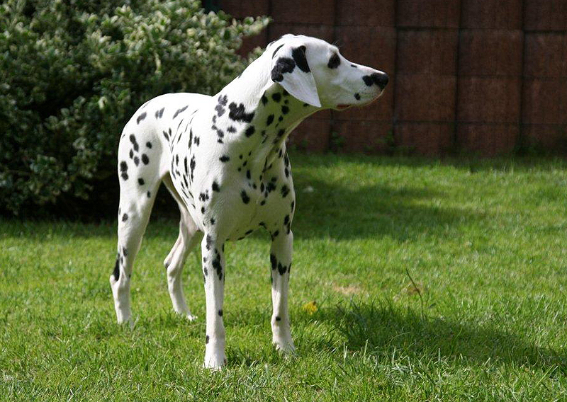 LUA (low uric acid) Dalmatinerhündin ohne das HUU-mutierte SCL2A9-Gen